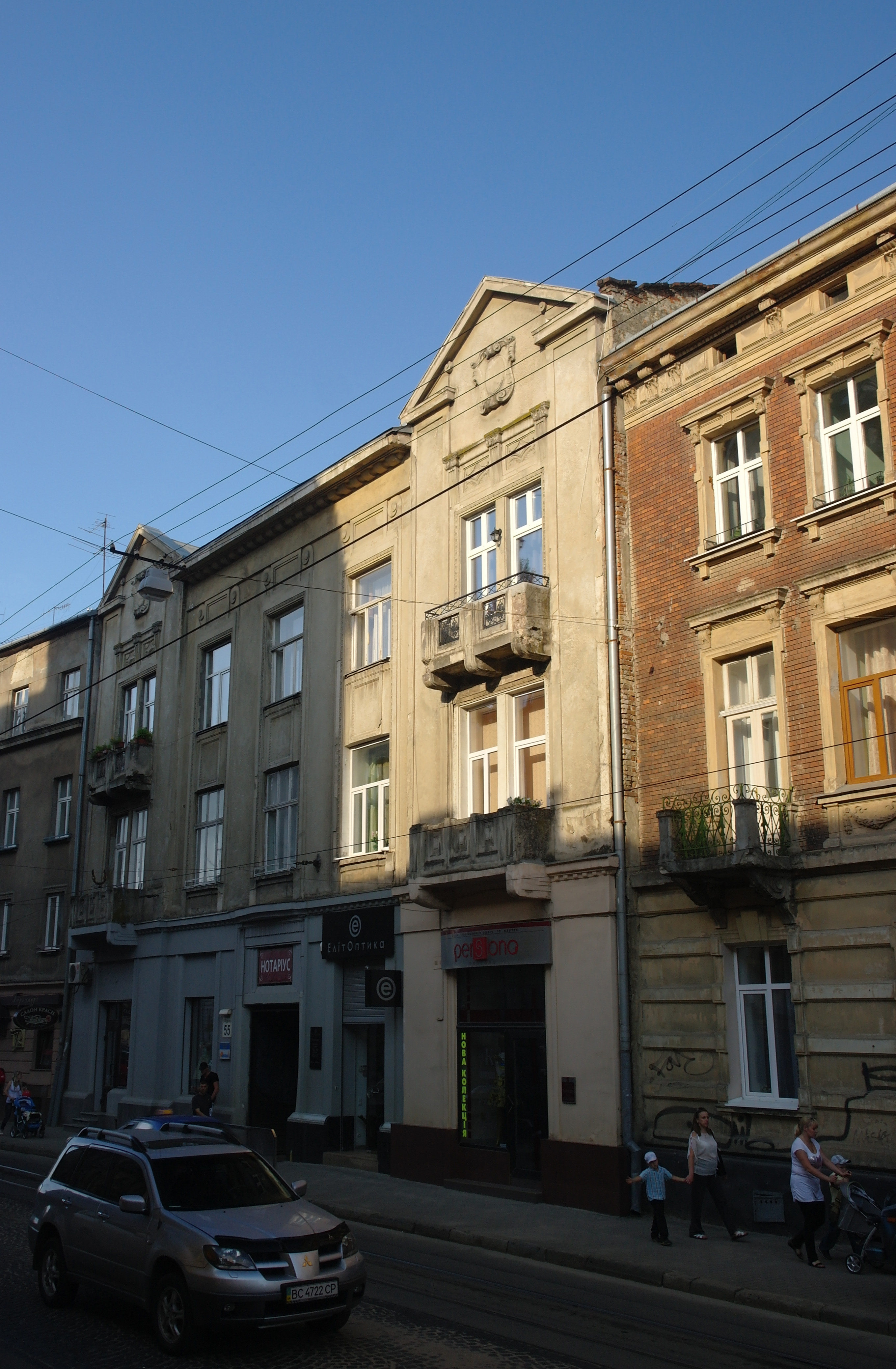 Львів, Франка, 55